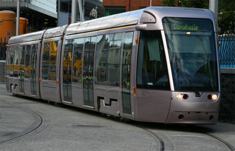 Wagon der LUAS in Dublin